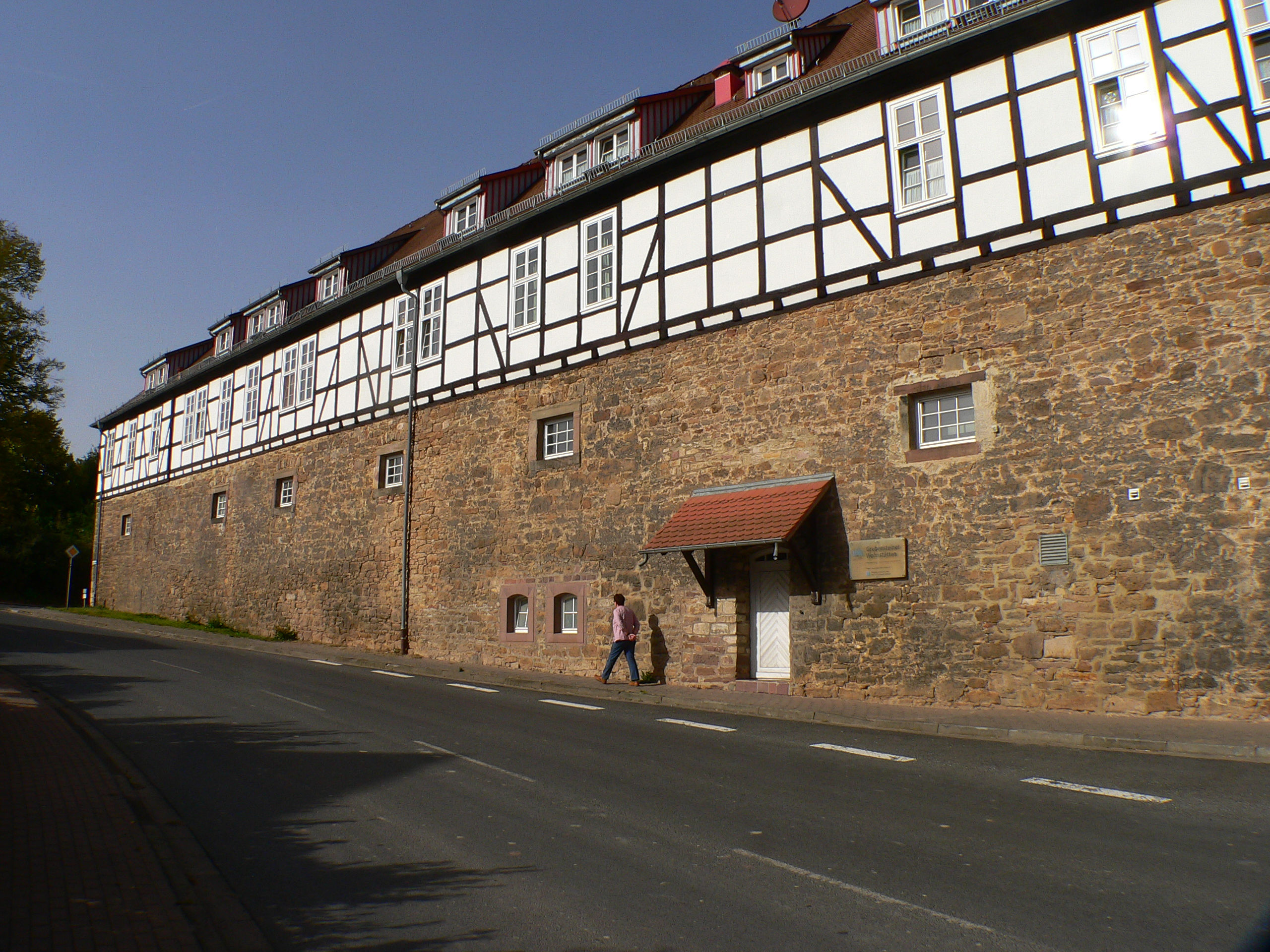 Burg Burguffeln in Grebenstein-Burguffeln im Landkreis Kassel, Hessen, Deutschland